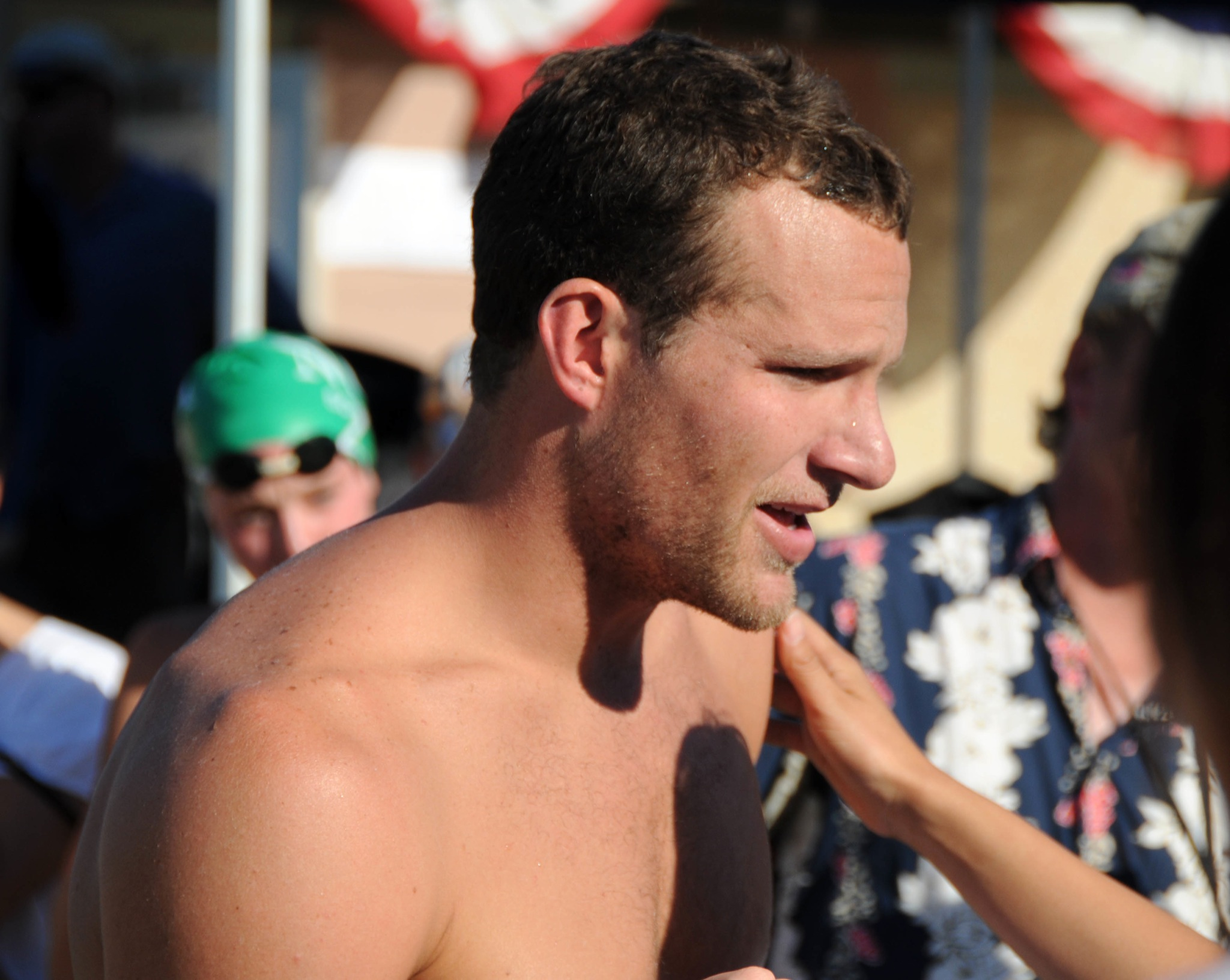 Brendan Hansen